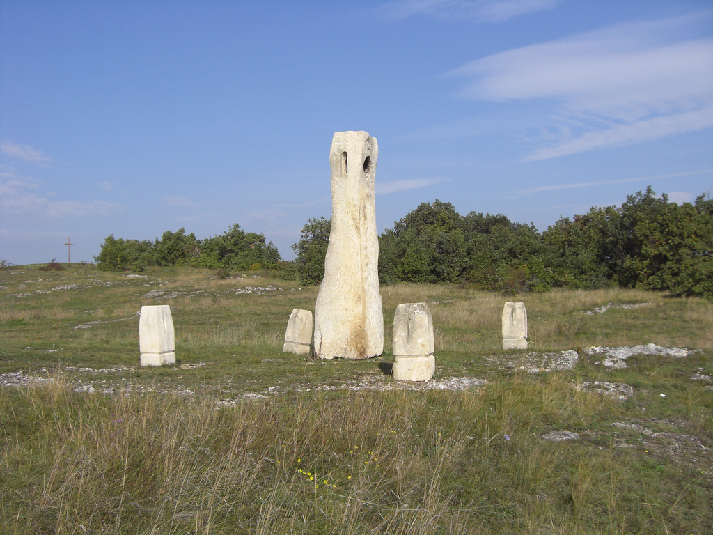 Symposion Europäischer Bildhauer, St.Margarethen, Burgenland, Austria mehr info auf